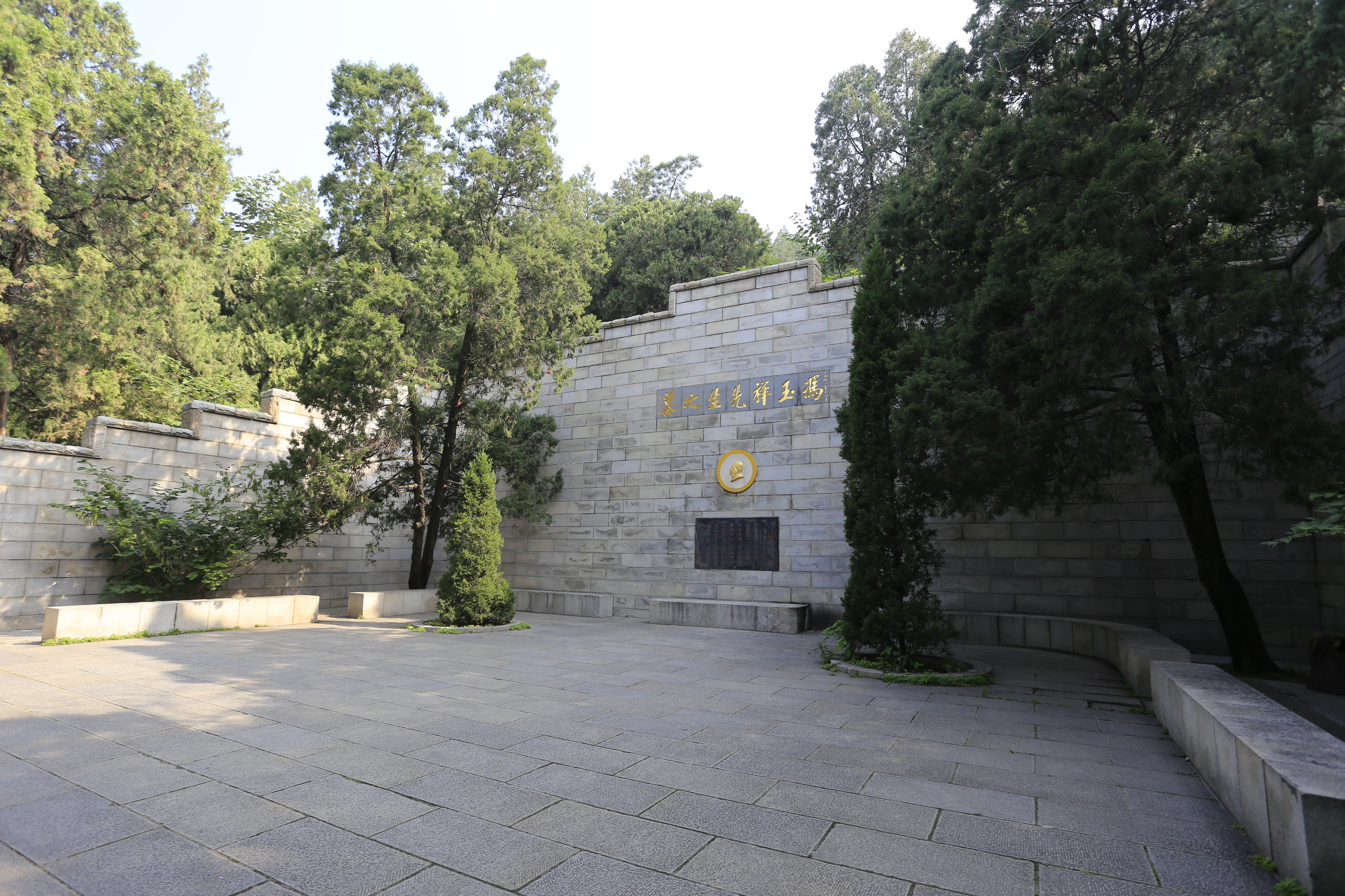 泰安冯玉祥墓